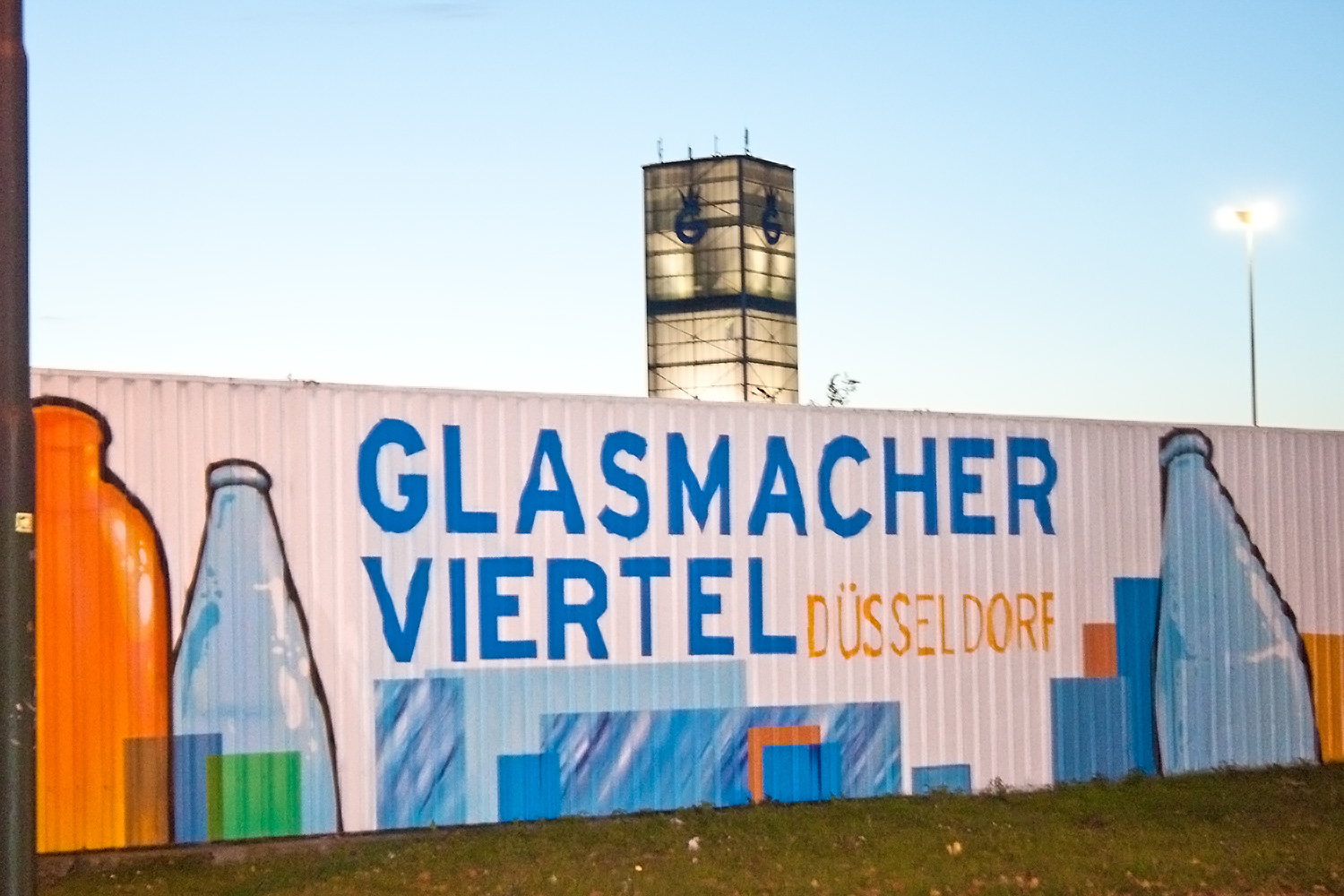 Beleuchteter Glasturm der ehemaligen Gerresheimer Glashütte. Davor bemalter Zaun. Heyerstraße, Düsseldorf.